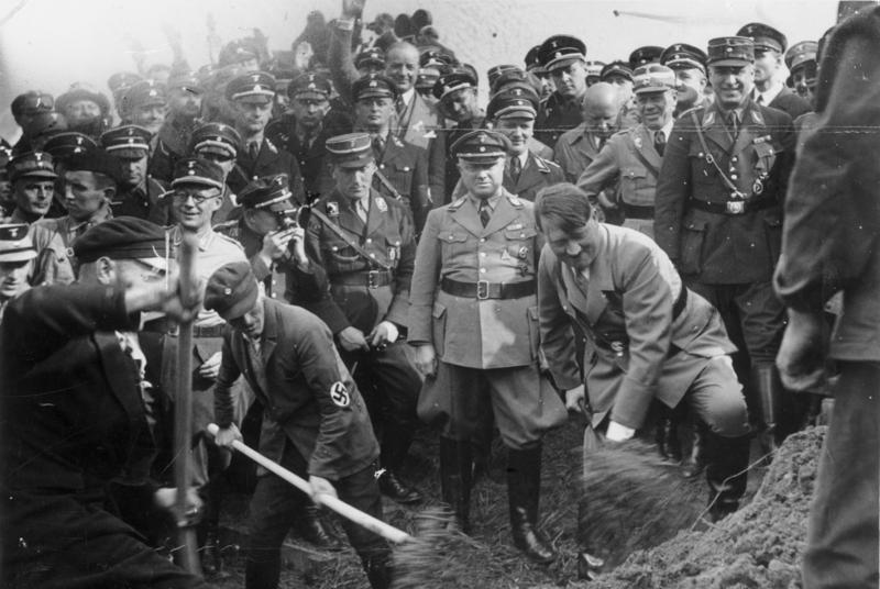 Zentralbild Adolf Hitler am 23. September 1933 beim ersten Spatenstich zum Reichsautobahnbau der Strecke Frankfurt/Main - Darmstadt-Mannheim, als Mittel zur Beseitigung der Arbeitslosigkeit. Hinter Hitler Bauleiter Jakob Sprenger, NSKK-Korpsführer Adolf Hühnlein und der Generalinspekteur für das deutsche Straßenwesen Ing. Fritz Todt. [Scherl Bilderdienst]